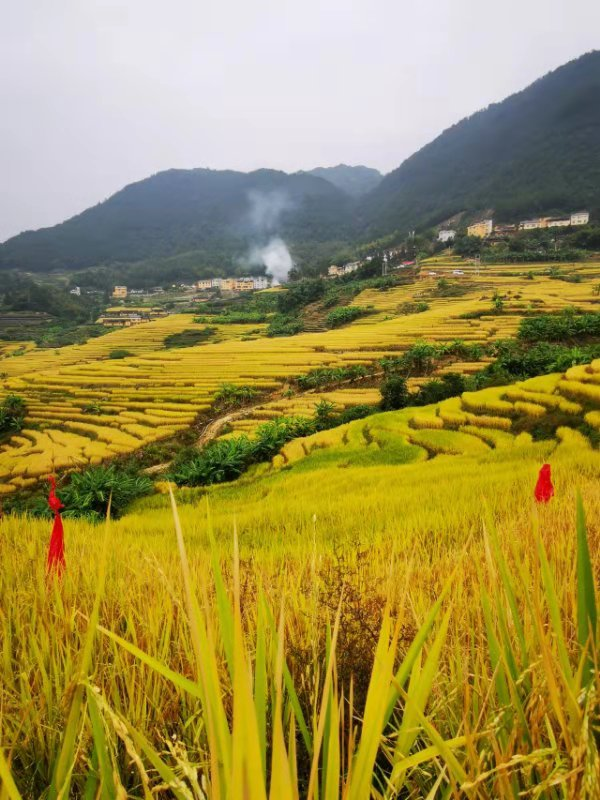 中文（中国大陆）: 华安湖林乡石井村千亩梯田